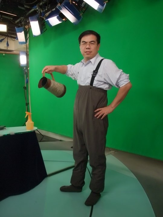 中文（台灣）: 彭啟明在攝影棚內。